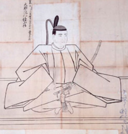 山内豊房の肖像。